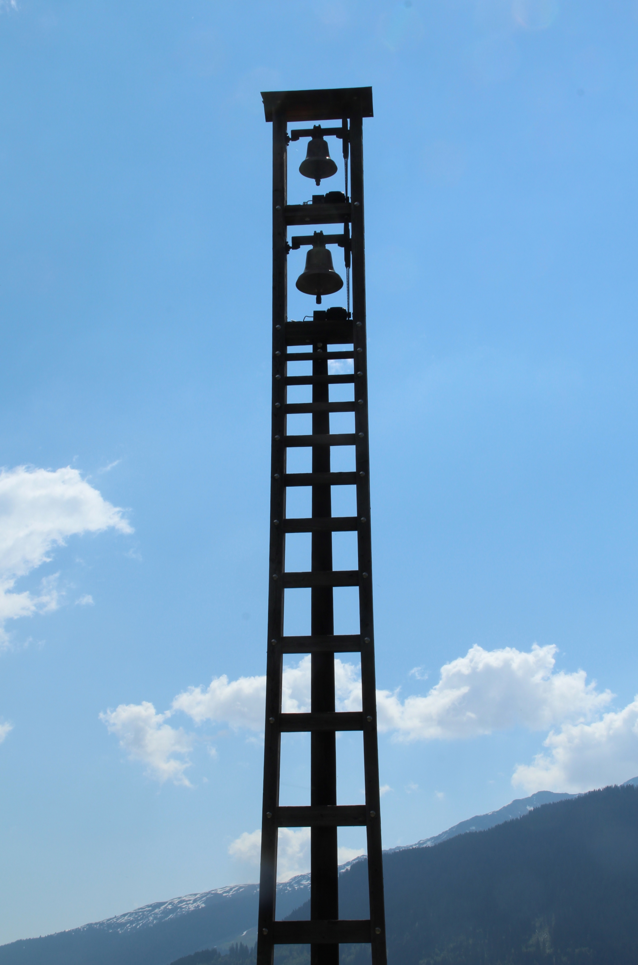 Caplutta Sogn Benedetg Turm